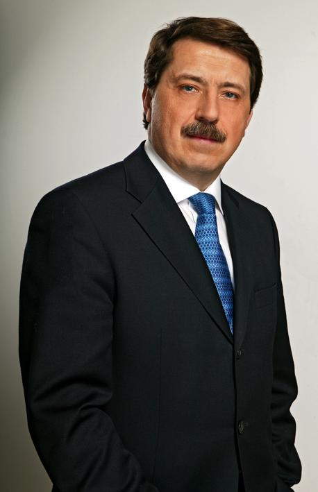 Pavol Paska Image